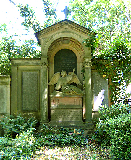 Grab Dr. Louis Mayer, Alter St.-Matthäus-Kirchhof, Abt. H. Foto L. Wekenborg (StMatthaeus)